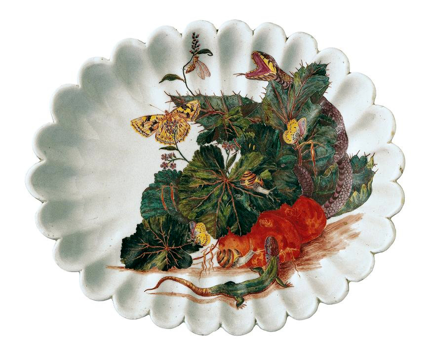 Carl Wendelin Anreiter von Ziernfeld, Fruttiera decorata con "Piante e serpi dipinte al naturale". Ginori a Doccia 1745-50.